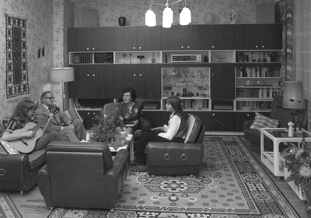 Dessau, Oberbürgermeisterin mit Familie ADN-Zentralbild Reporter: Link Februar 1981 Dessau - 13. Großstadt der DDR. Dessauer Oberbürgermeister Thea Hauschild nach einem arbeitsreichen Tag beim gemütlichen Beisammensein mit ihrem Ehemann Werner - er ist von Beruf Richter und ihren beiden Töchtern, den Oberschülerinnen Birgit (13 Jahre) und Katrin (links, 16 Jahre). Wie bewältigt eine gesellschaftlich so stark beanspruchte Frau und Mutter von drei Kindern ohne Haushalthilfe auch noch die familiären Belange? " Mir macht auch die Arbeit beim Einkauf Freude. Außerdem sind wir mein Mann und meine beiden Kinder umsichtige Helfer. Die Arbeiten werden bei uns aufgeteilt und alle helfen mit." Um sich zu erholen und gesund zu halten, fährt der Oberbürgermeister auch gern mal mit dem Fahrrad duch die ständig wachsende, sich verändernde und aufblühende Stadt. Abgebildete Personen: Hauschild, Thea: Bürgermeisterin von Dessau, DDR